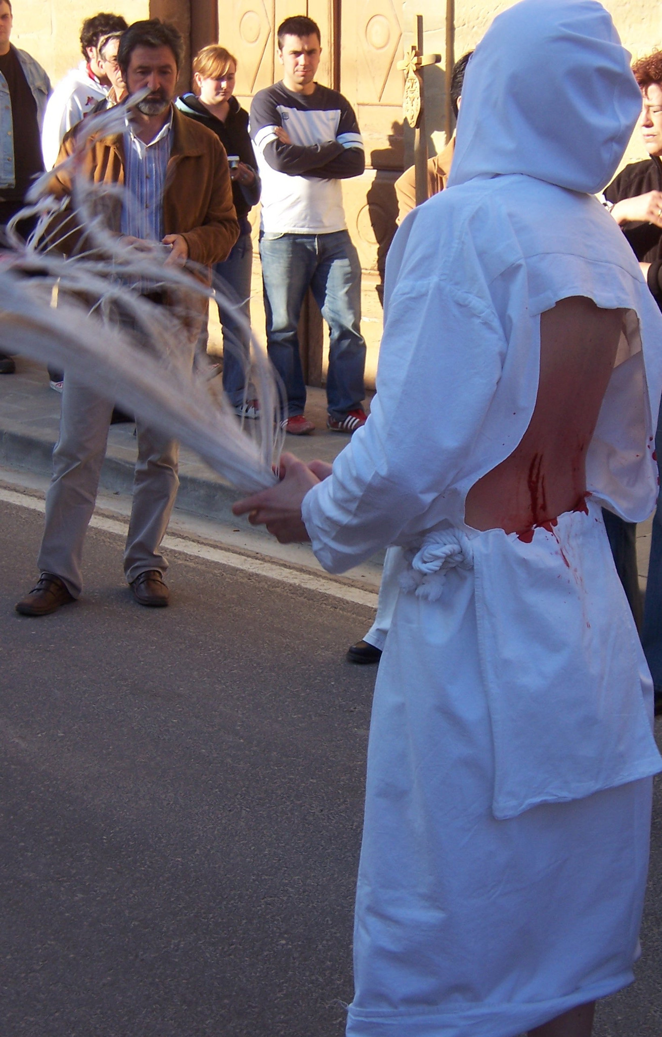 Disciplinante golpeandose tras haber sido picado. San Vicente de la Sonsierra. La Rioja (España)